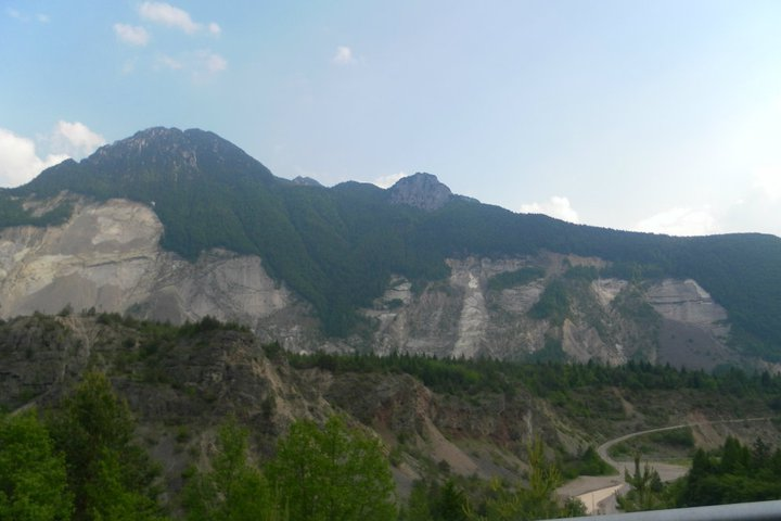 Frana del Monte Toc, Erto e Casso (PN)